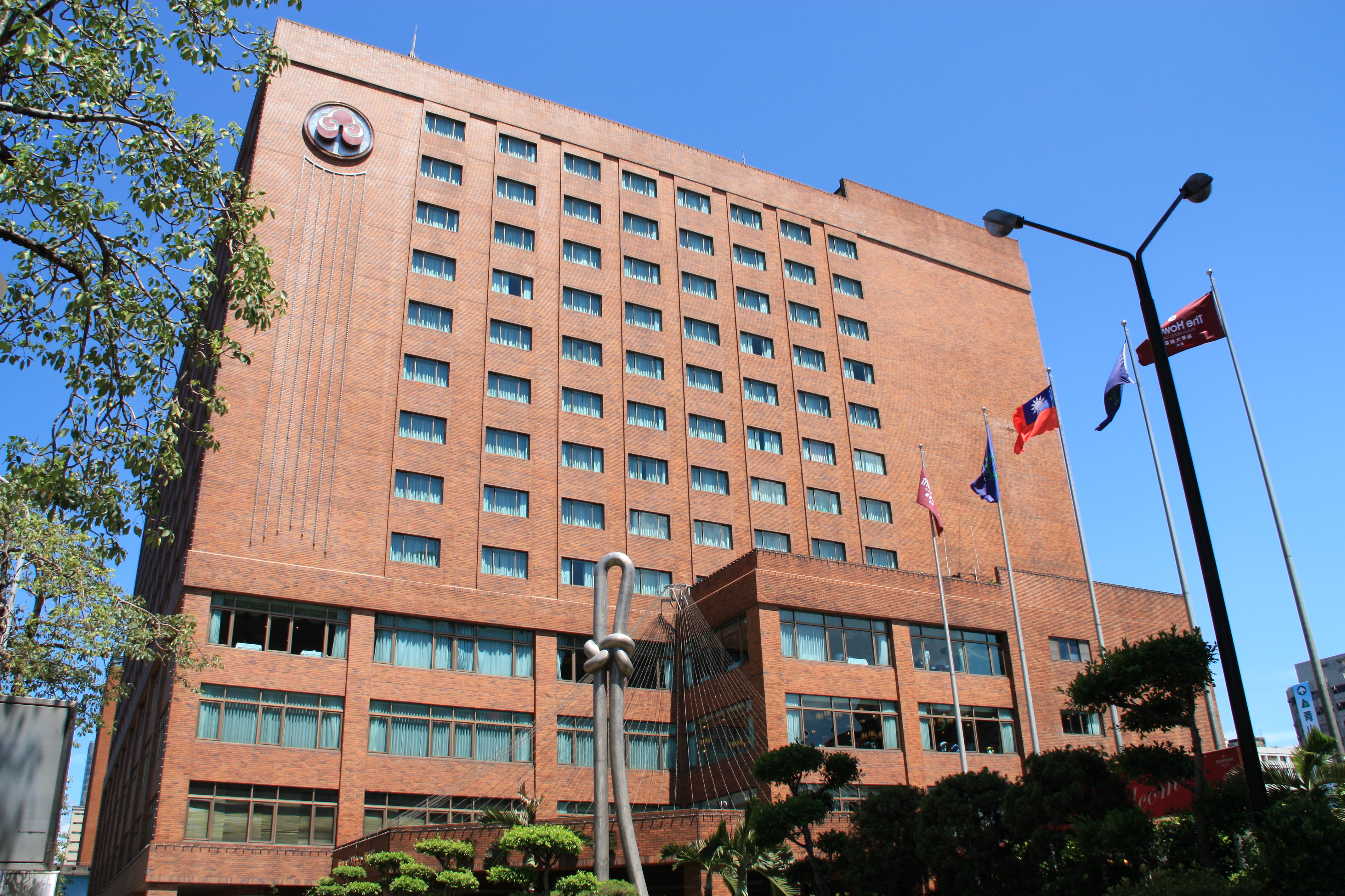 臺北福華大飯店，地址：臺北市大安區仁愛路三段160號。